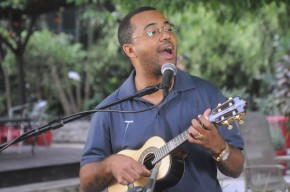 Cantor brasileiro Dudu Nobre em imagem do acervo da TV Brasil.